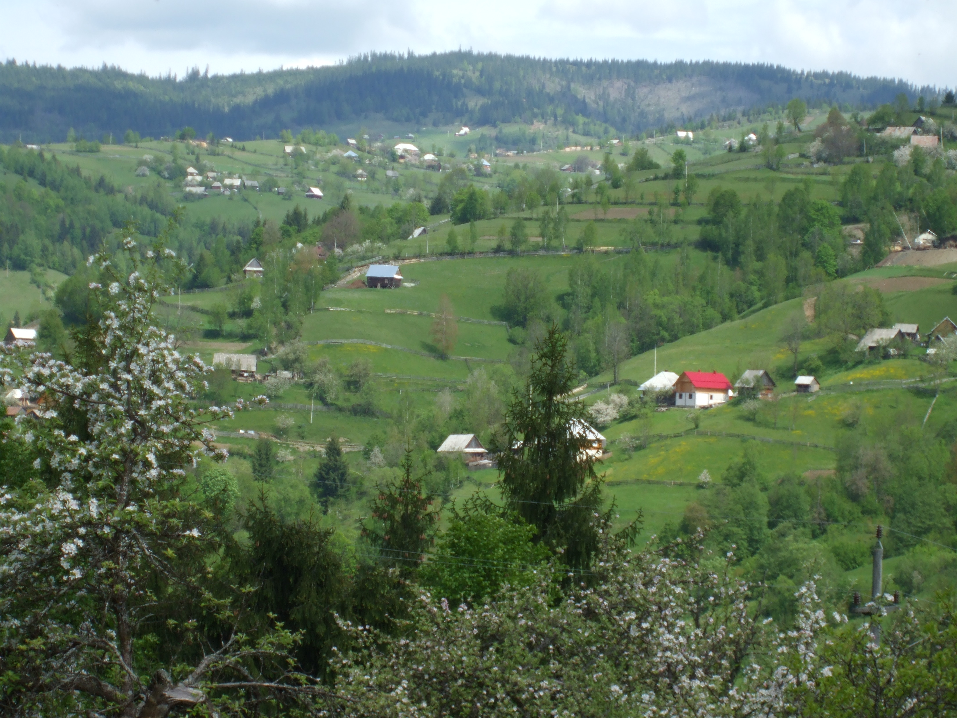 Satul Niculeşti, com. Horea, jud. Alba